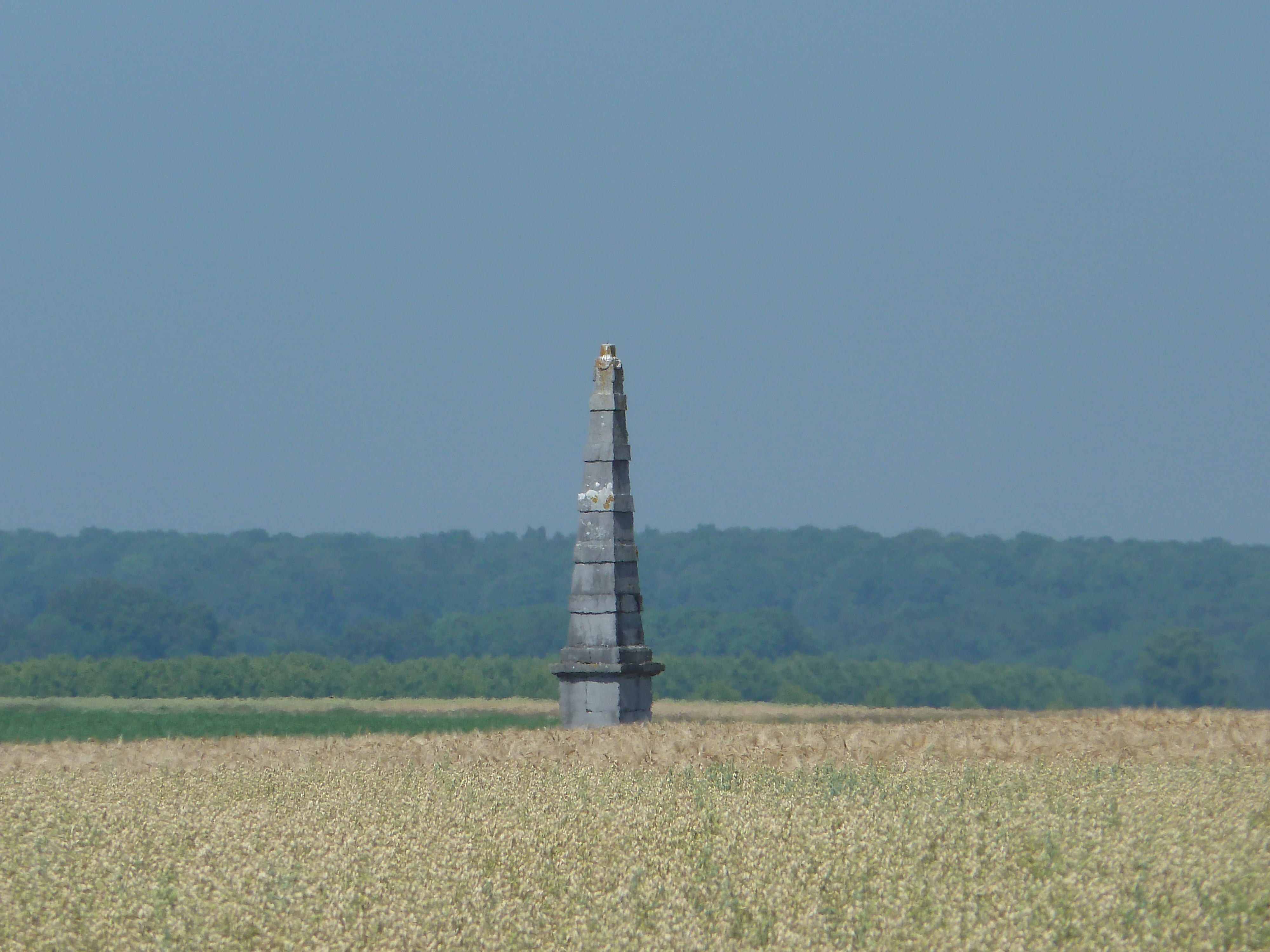 Pyramide de Verlée, Havelange, Belgique